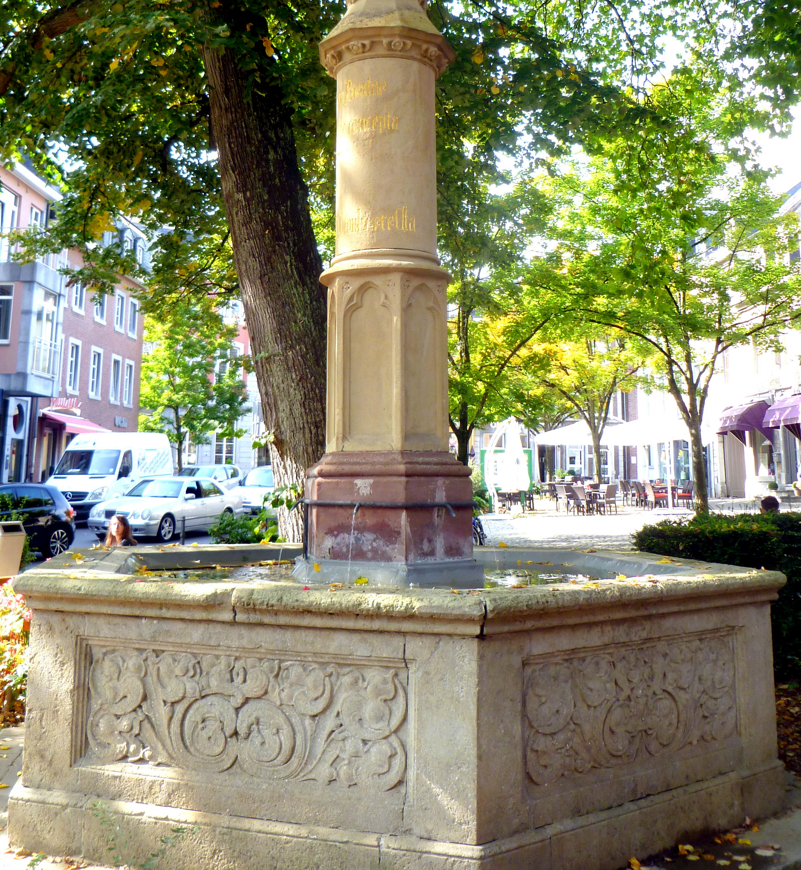 Brunnenbecken und Mittelteil der Mariensäule auf dem Marktplatz in Eupen